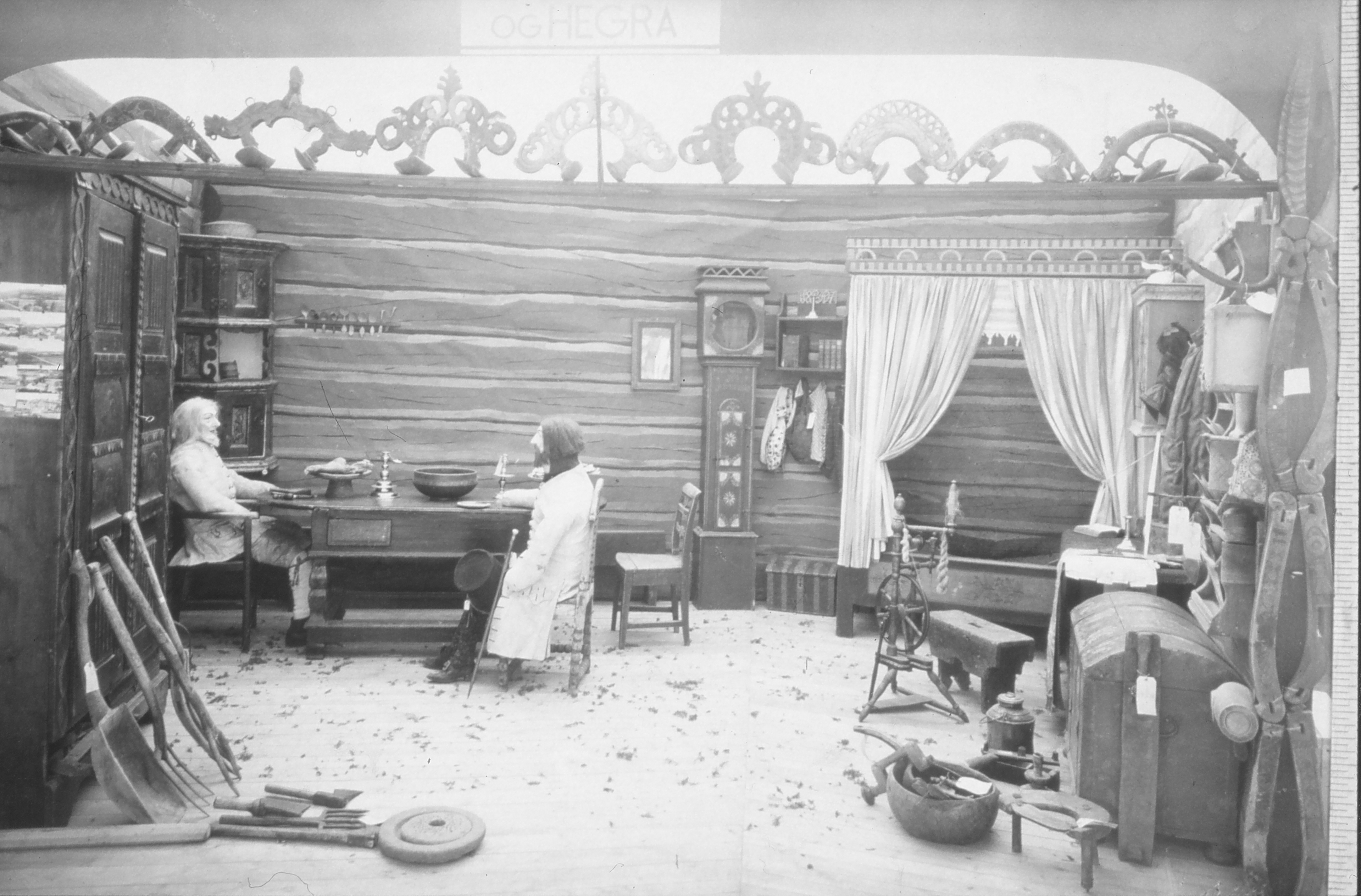 Gårdsinteriør fra Hegra ved Trøndelagsutstillingen 1930.